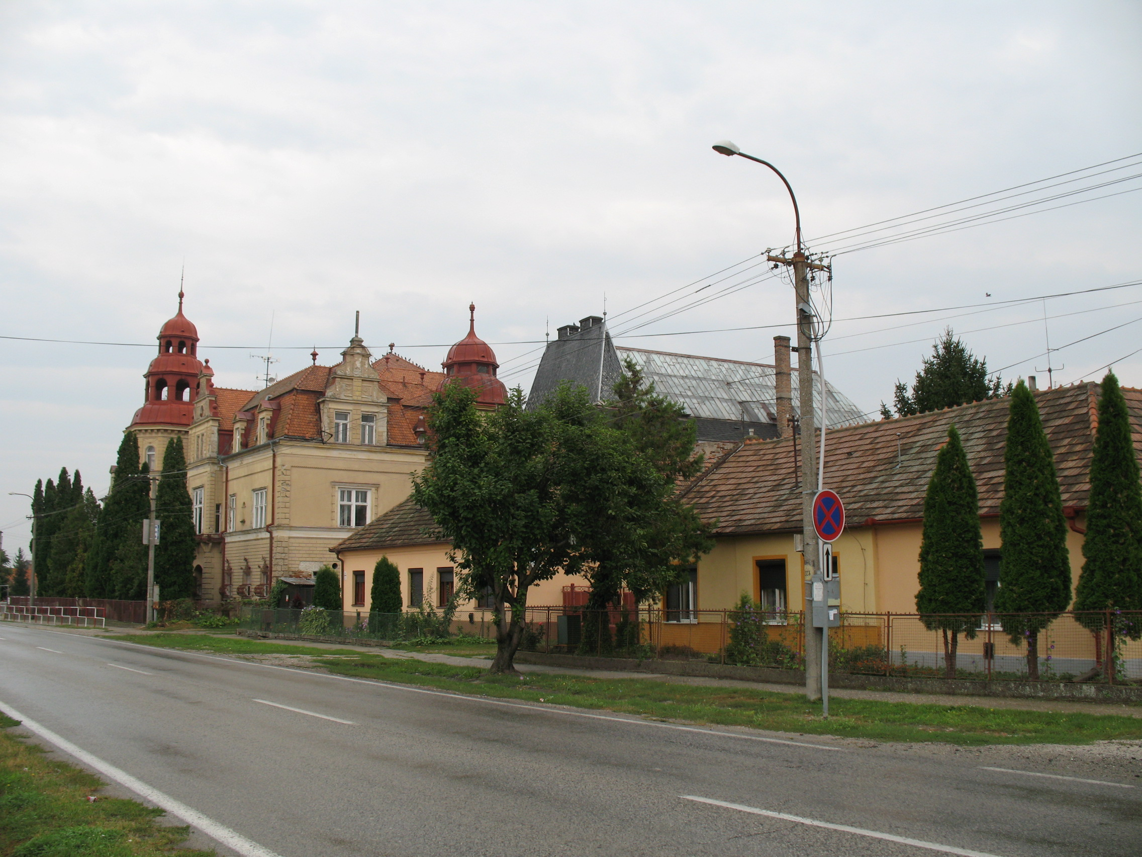 Diószeg